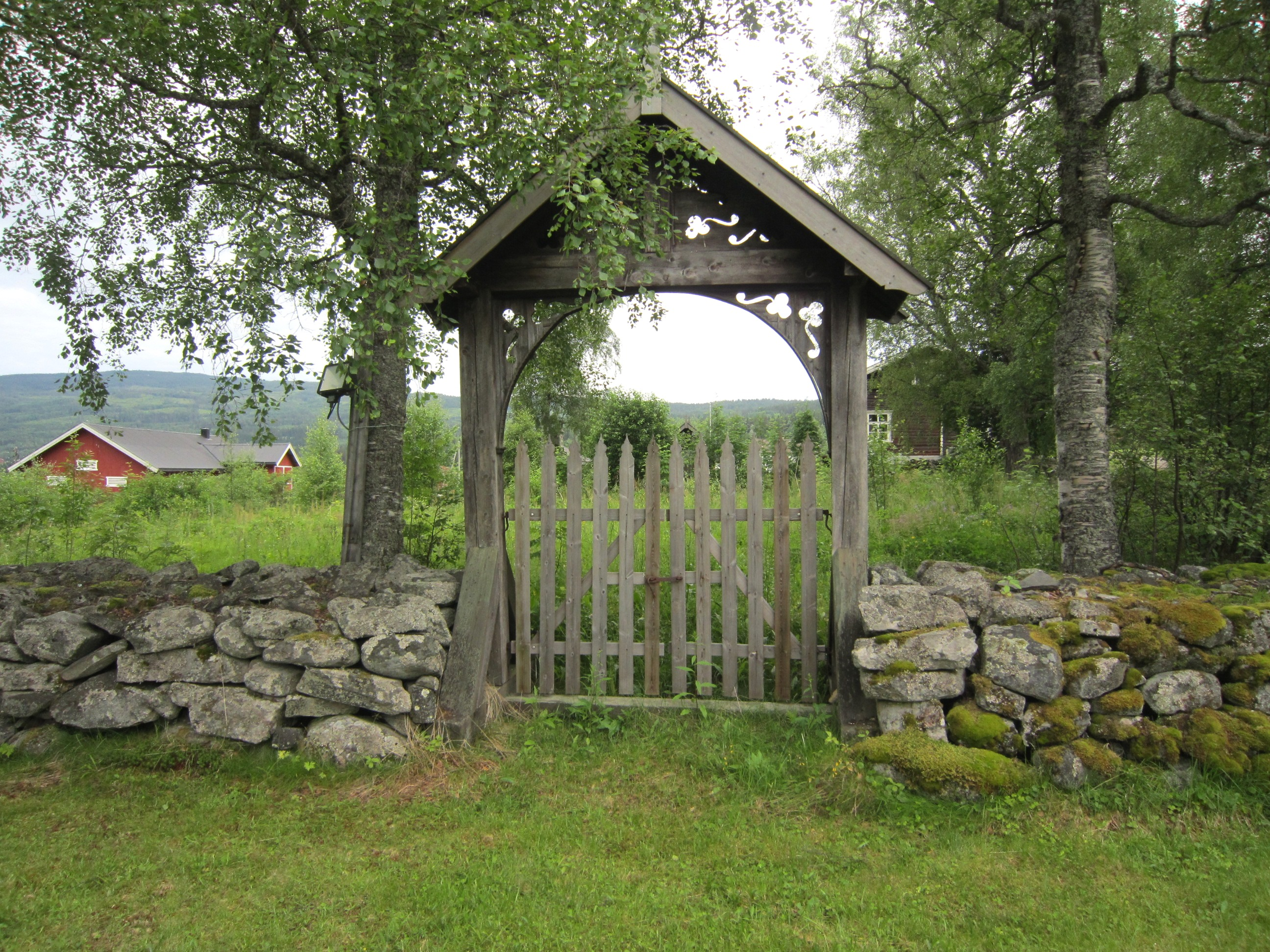 Veggli gamle kirkegård. Bak denne muren stod en gang Veggli stavkirke.